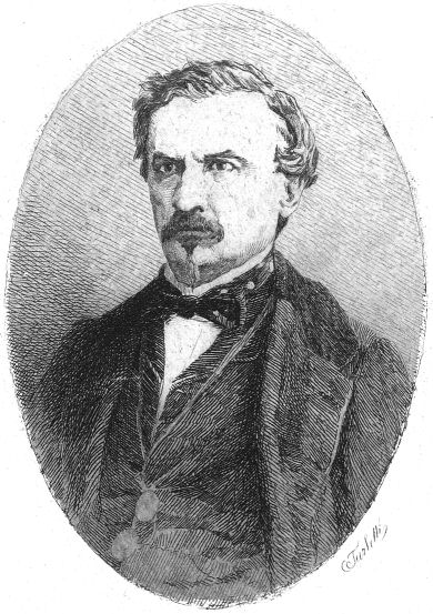 Ritratto del politico Michelangelo Castelli (1808-1875) di Celestino Turletti (1845-1904). Fonte: Archivio Accademia Urbense, Ovada.